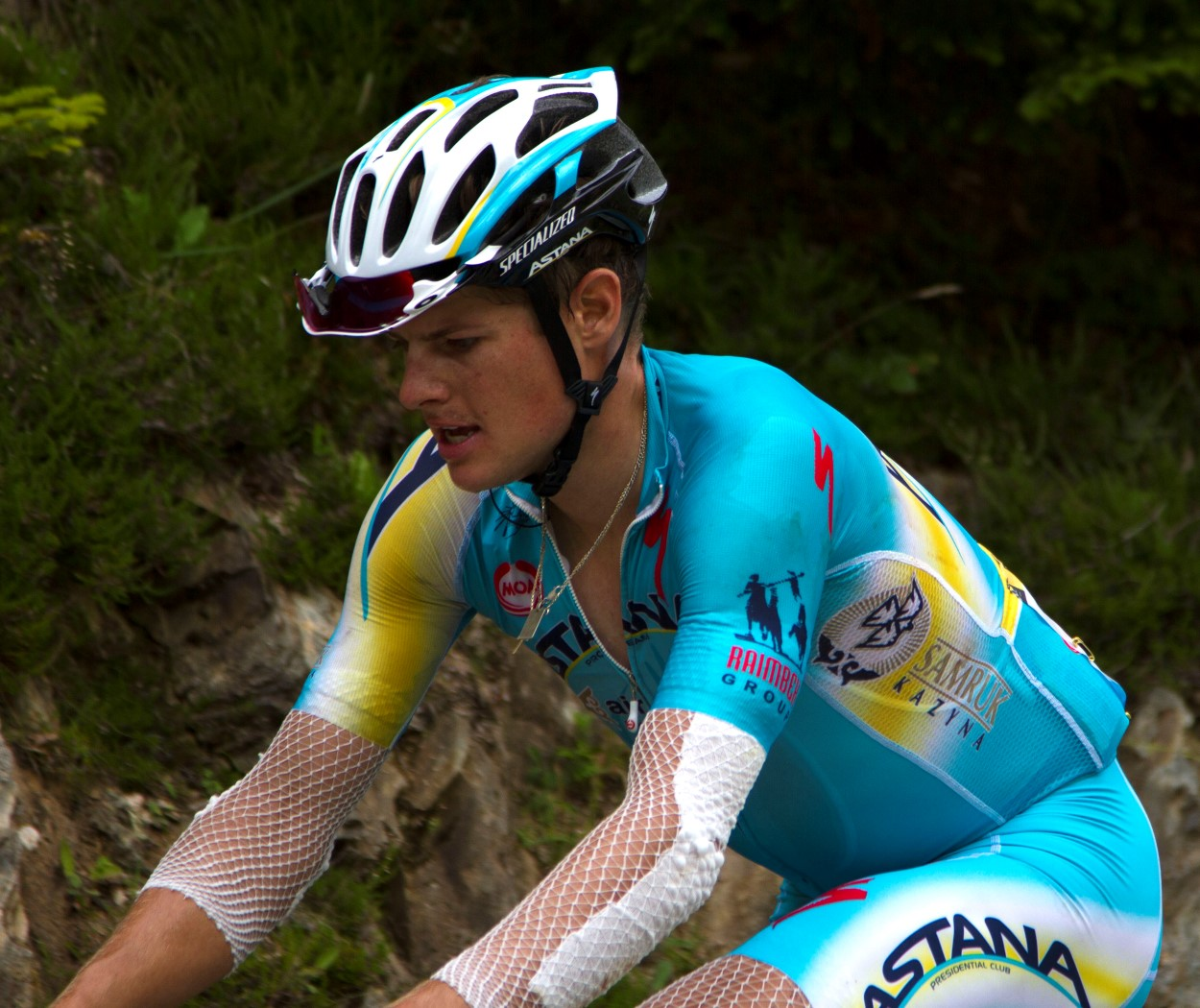 143 fuglsang aka de rijdende worst